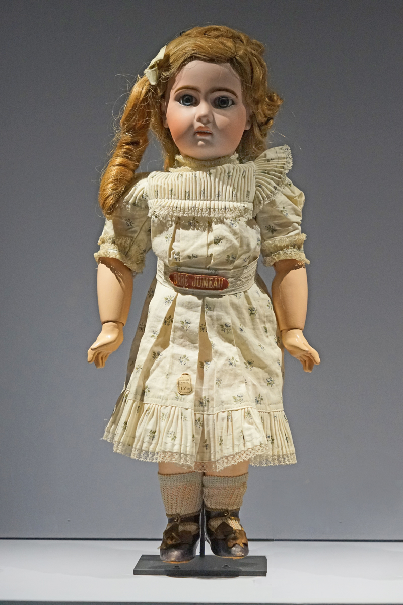 Poupée Bébé Jumeau, d'Emile Jumeau, fabricant (Paris 1842-1901) France, fin 19è siècle Tête en biscuit de porcelaine dure, corps en composition, vêtements en tissu Achat en 1915 En introduction à l'exposition sur la poupée Barbie, le musée des arts décoratifs expose cette poupée de la maison Jumeau de Paris qui était destinée à témoigner du raffinement des vêtements français pour enfants. En effet, dès le XVIIIè siècle, des poupées de mode, montrant les tendances des nouveaux vêtements créés en France, étaient largement diffusées en Europe. Ces poupées servaient de modèles et dictaient la mode. Objet présenté dans l'exposition Barbie ® au musée des arts décoratifs à Paris